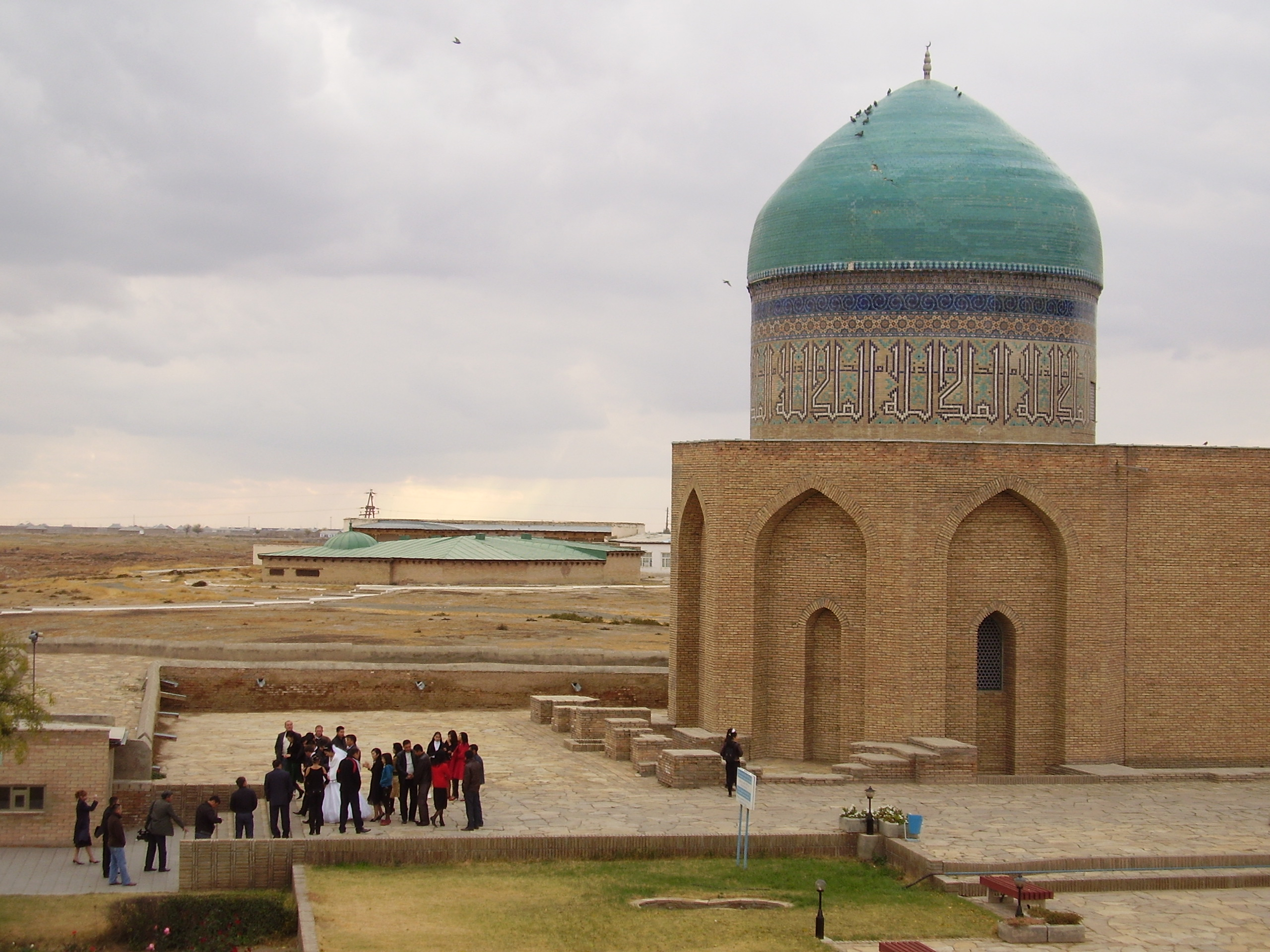 Мусульманская свадебная процессия по дороге к ханаке Ахмеда Яссави (каз. Қожа Ахмет Ясауи кесенесі) в городе Туркестан, Казахстан. На переднем плане — мавзолей Рабиги Султан Бегим, на заднем — крыша над «Большим Хильветом», средневековым суфийским культовым подземным сооружением, в настоящее время превращённым в музей.